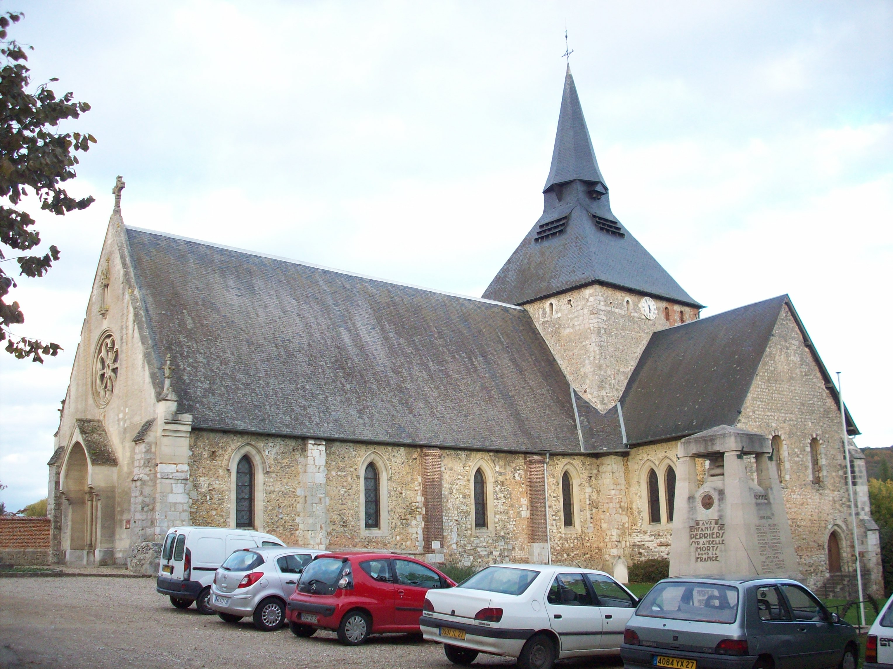 Eglise romane Saint-Etienne de Perriers-sur-Andelle.